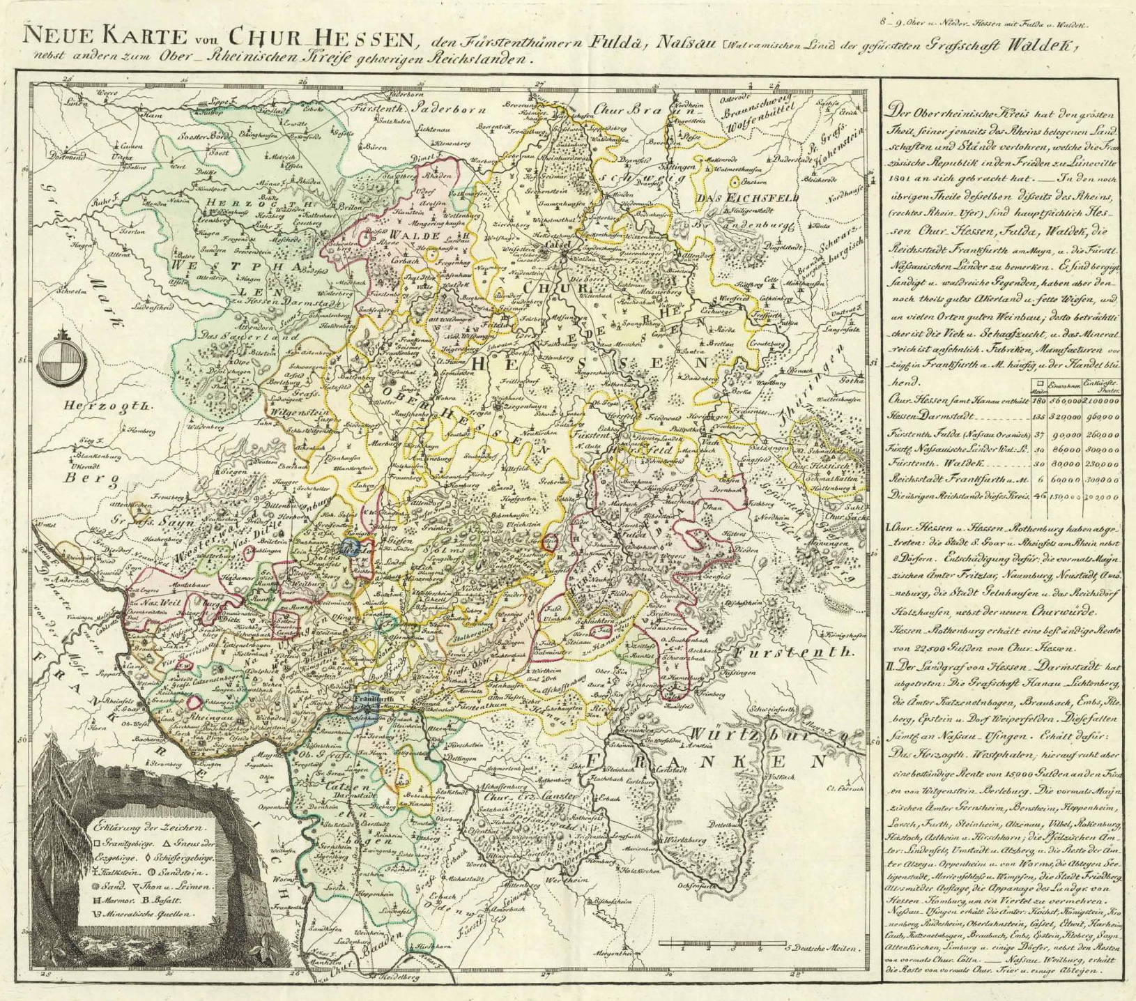 Titel: „Neue Karte von Chur-Hessen, den Fürstentümern Fulda, Nassau (Walramischen Linie) der gefürsteten Grafschaft Waldek, nebst andern Ober-Rheinischen Kreise gehoerigen Reichslanden“ Stellt dar: (Landgrafschaft Hessen-Kassel) Kurhessen mit den damaligen Fürstentümern Fulda, Nassau und Gefürstete Grafschaft Waldeck dar Weitere Informationen: Altkolorierter Kupferstich von Johann Elias Lange, Unten links Kartusche mit Erklärungen. Am rechten Rand ausführliche Erklärungen. Die Karte mit Titelkopfleiste. Seltener Druck vom Leipziger Drucker, Stecher und Verleger Johann Elias Lange. Erschienen in: "Neuer Indemnisations- u. Grenzatlas von Deutschland", 1803, 31,5 x 35 (Tooley's Dic. of Mapm. Rev. Ed. K - P) (J.E. Lange. German engraver. Leipzig, 1788; 'Königreich Dánemark', 1791; 'Preussischen Staaten', 1796.)